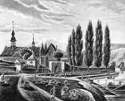 Eisbreche mit Sandtor der mittelalterlichen Stadtbefestigung und Ritter-Schwalbach-Haus von Boppard